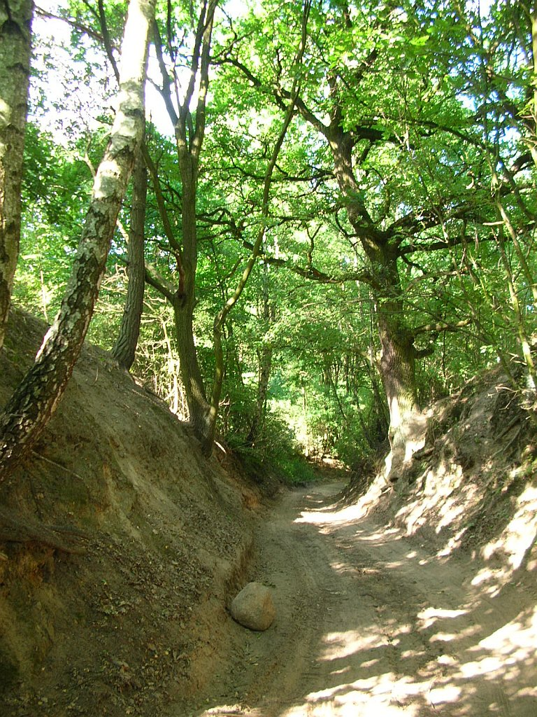 Parów w Lesie Jastrzębie - Bydgoszcz Fordon